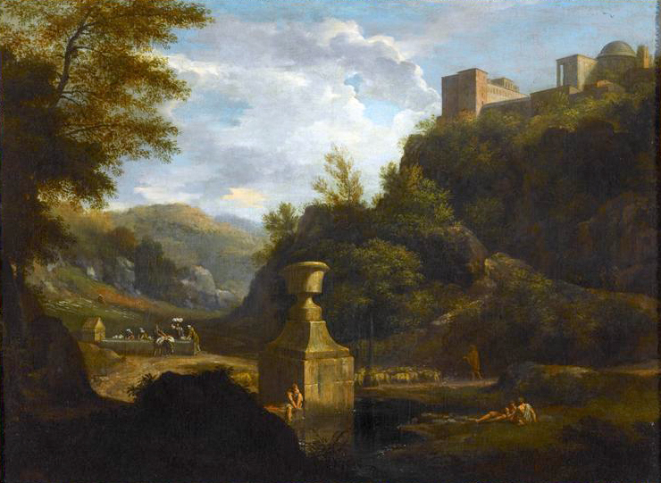 Le Chemin de Riccio près d'Albano (Nantes, musée des Beaux-Arts INV79)